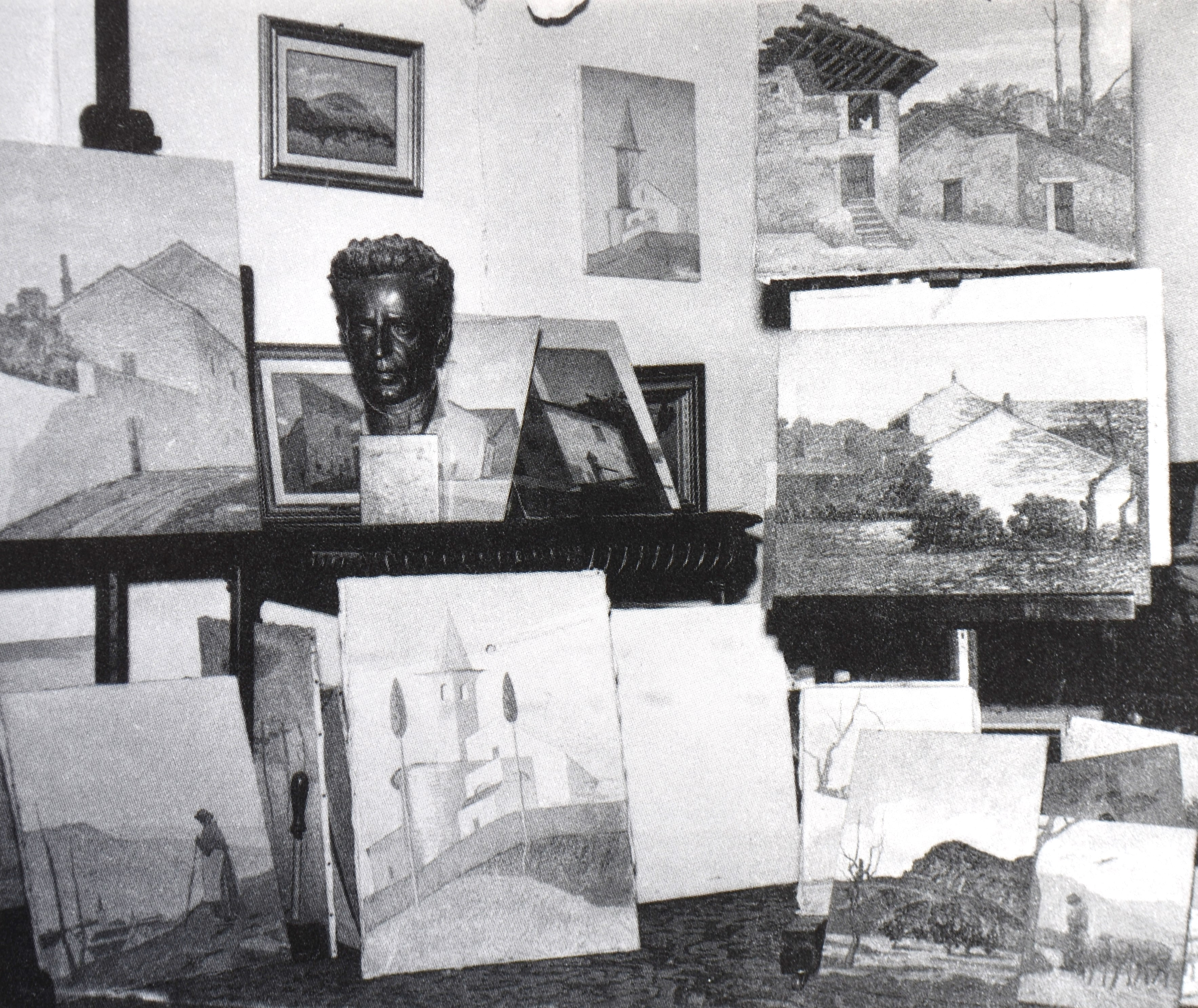 Lo studio del pittore Angelo Rescalli